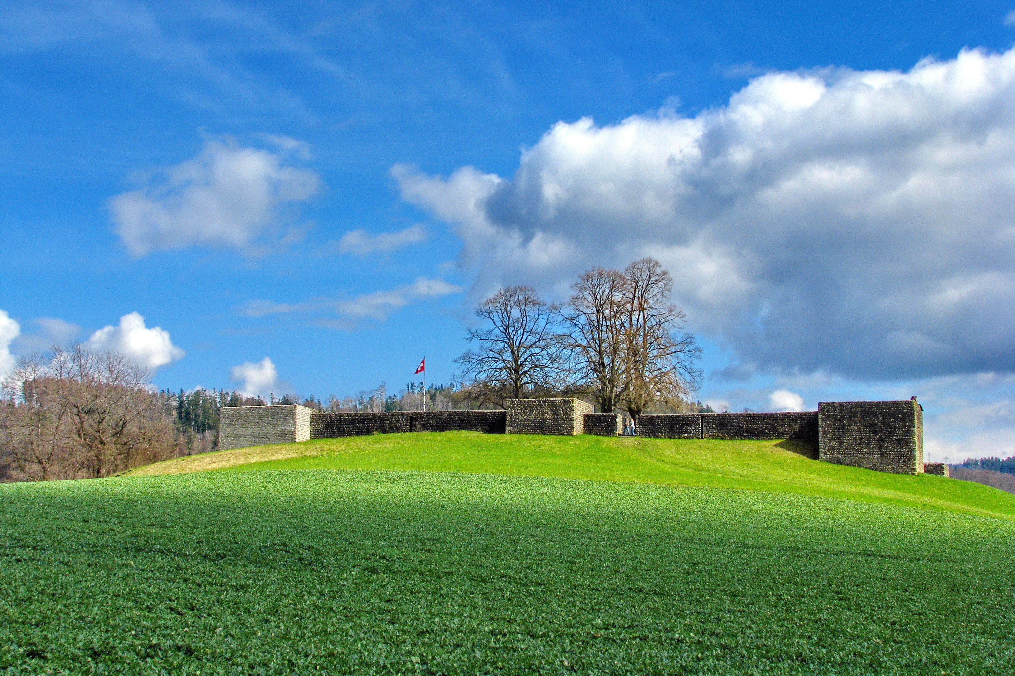 Römisches Kastell in Irgenhausen (Switzerland)